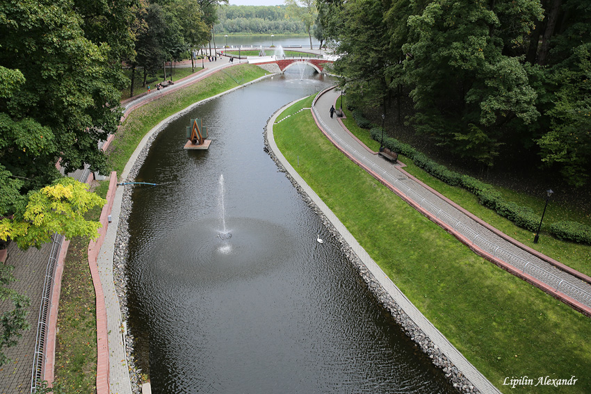 Гомельскі палацава-паркавы комплекс